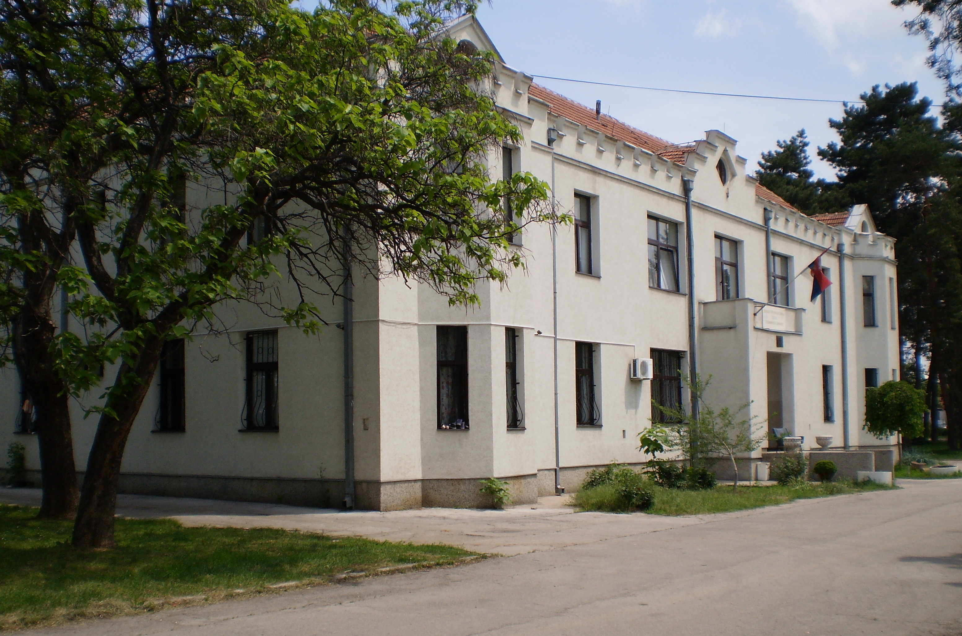 Srpski (latinica): Objekt Stevan Sinđelić, u gradu Nišu poznat kao "Engleski dom", danas, u ulici Kosovke djevojke br.6.